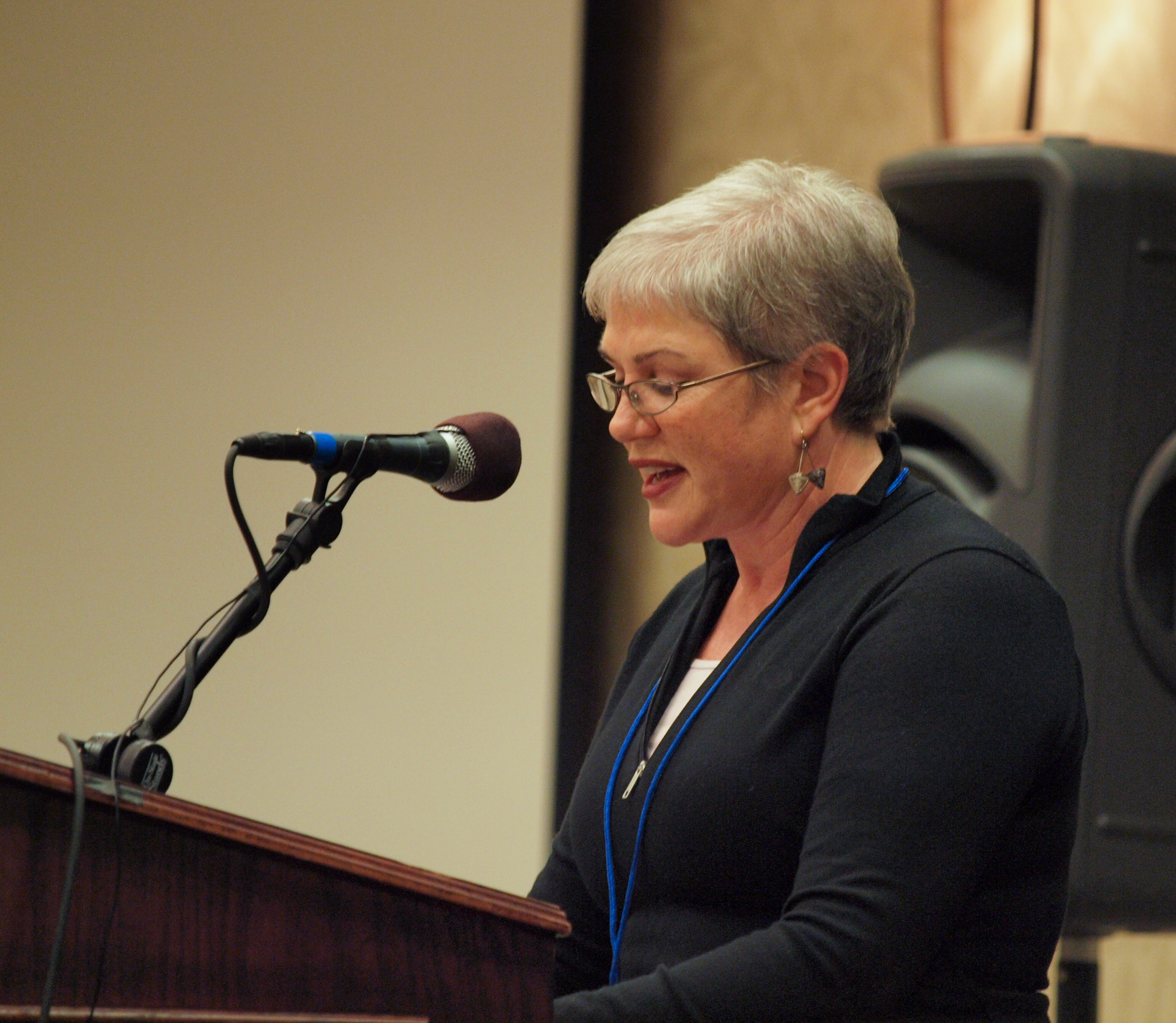 Julia Sweeney Madison, WI __________________________ Julia on Wikipedia